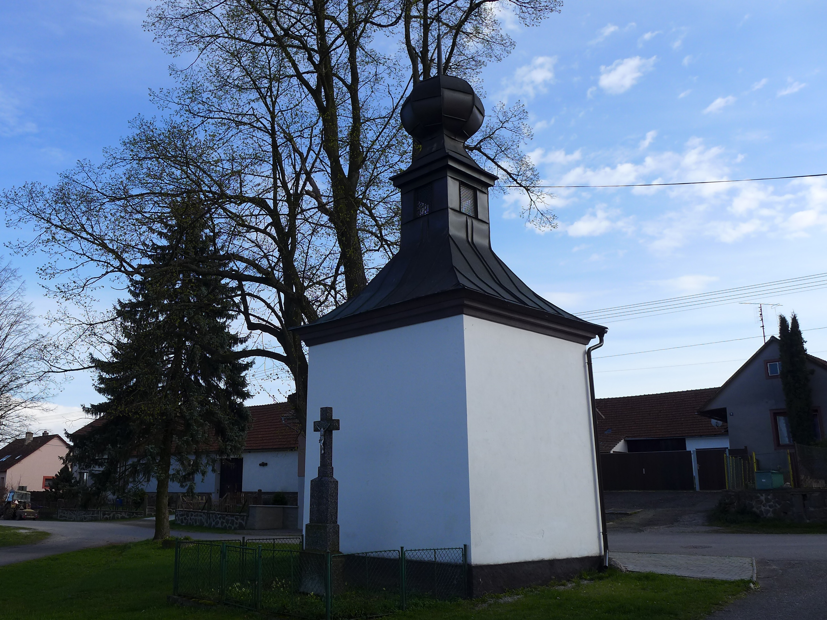 Kaple, Oslavice.